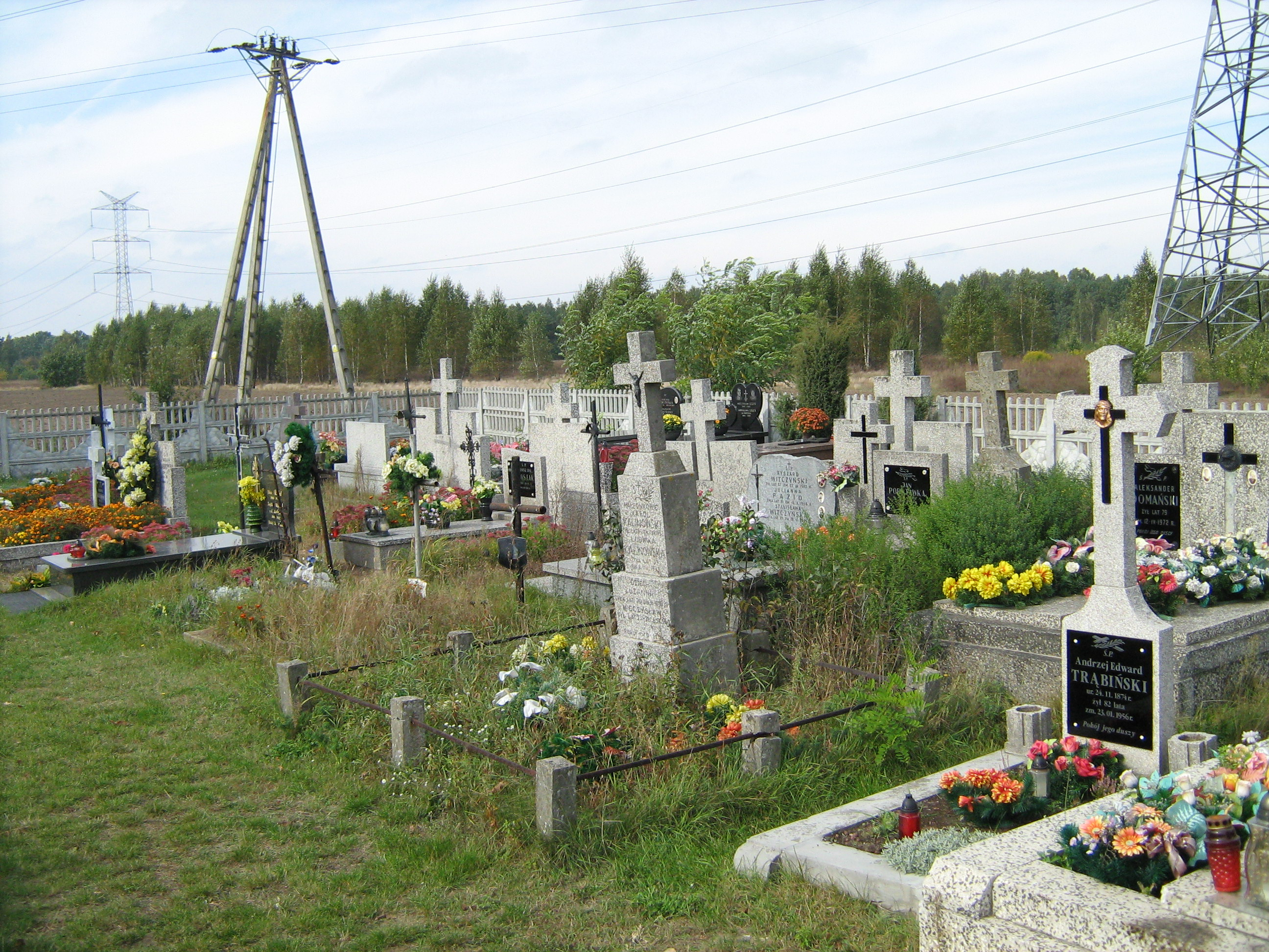 Catholic Mariavite Church Cementery in Dluga Koscielna (Poland) Cmentarz Kościoła Katolickiego Mariawitów w Długiej Kościelnej